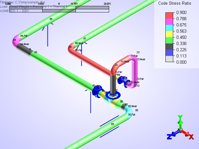 דוגמה לאנליזת חוזק של צנרת לחץ חמה. האנליזה נעשית באמצעות תכנה המחשבת בשיטת האלמנטים הסופיים תוך שימוש באלמנט קוי.